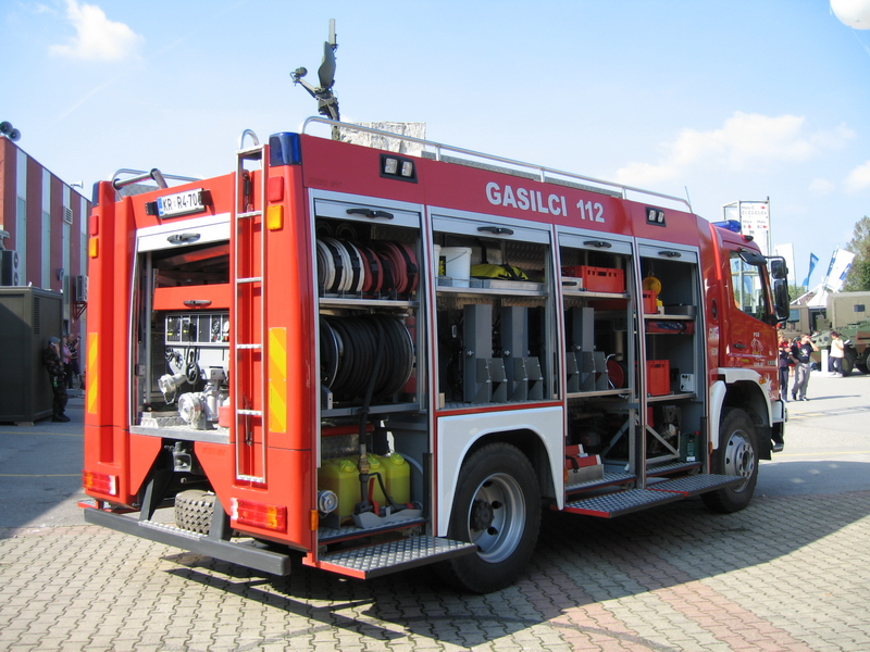 Fire engine in Slovenia